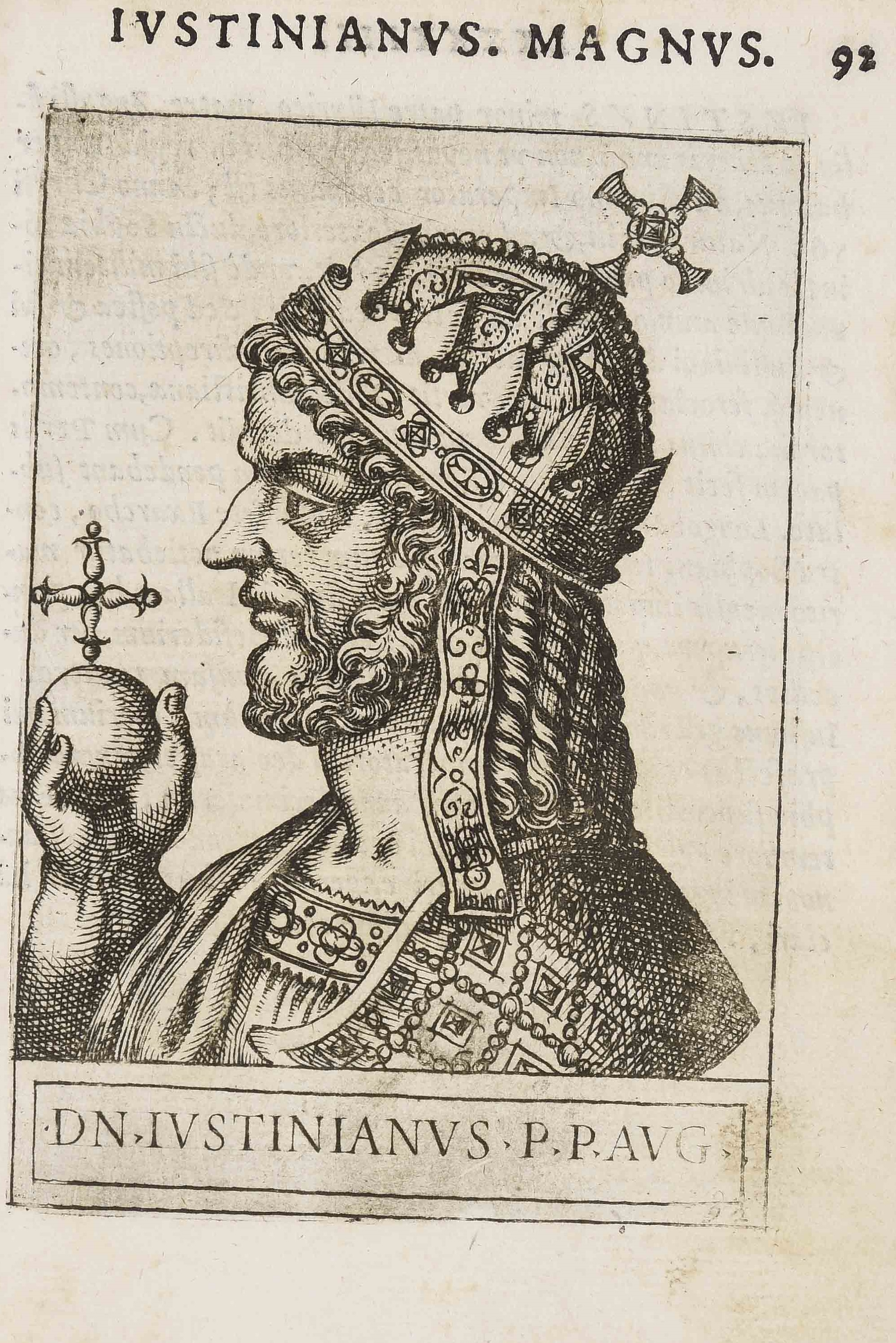 Calcografia in Giovanni Battista Cavalieri & Thomas Treterus, Romanorum imperatorum effigies, Roma, Vincenzo Accolti, 1583.